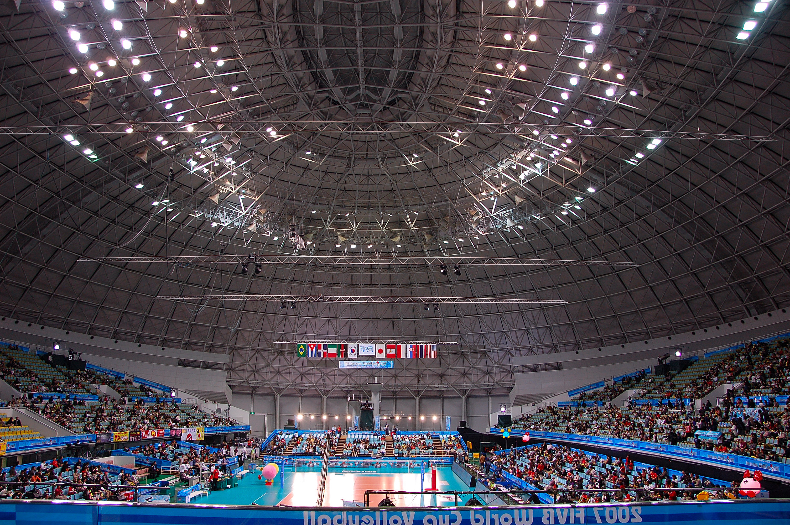 Nov 6, 2007 at 17:12 JST, Kadoma/Osaka